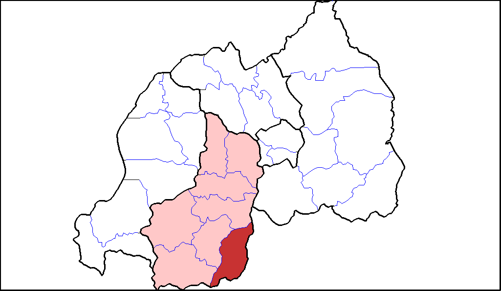 Distretto di Gisagara.